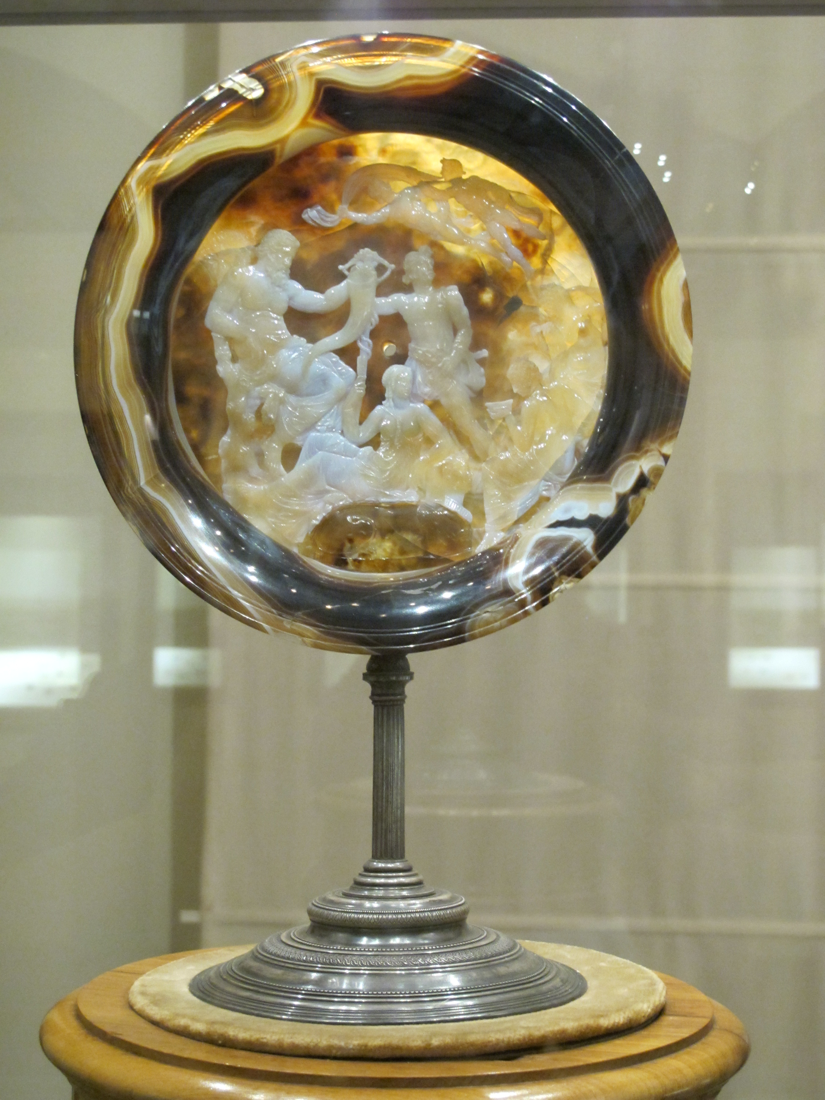 Inside: allegorical scene. Outside:gorgoneion. front view